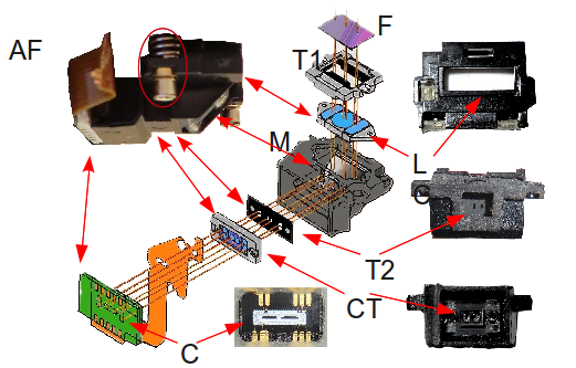 Composants du module autofocus d'un Minolta Maxxum et schéma.